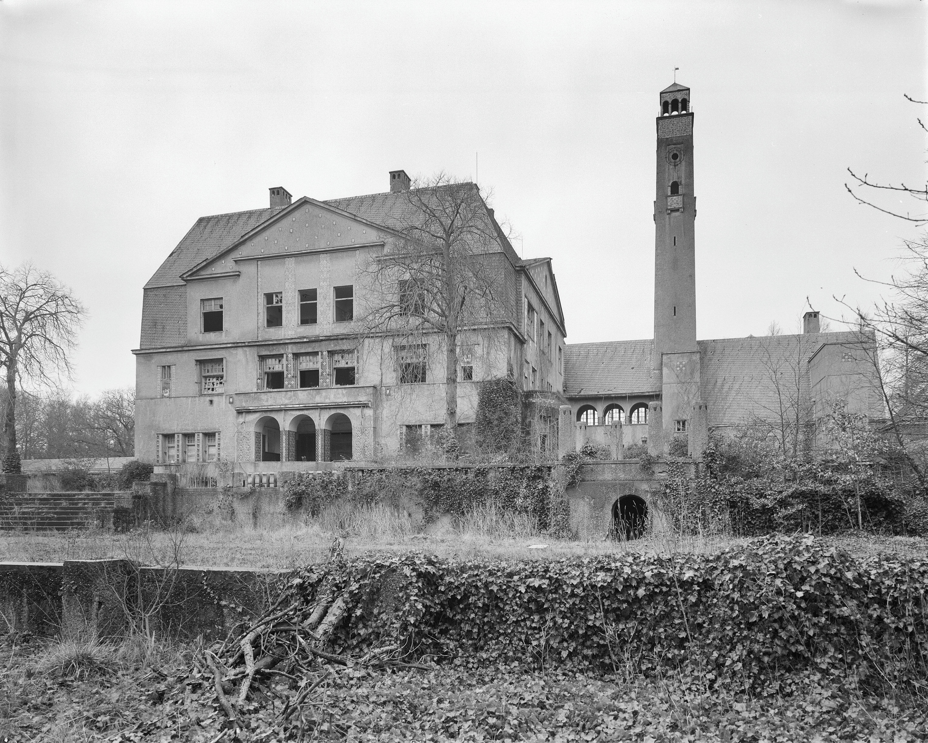 Landhuis Kareol: achtergevel